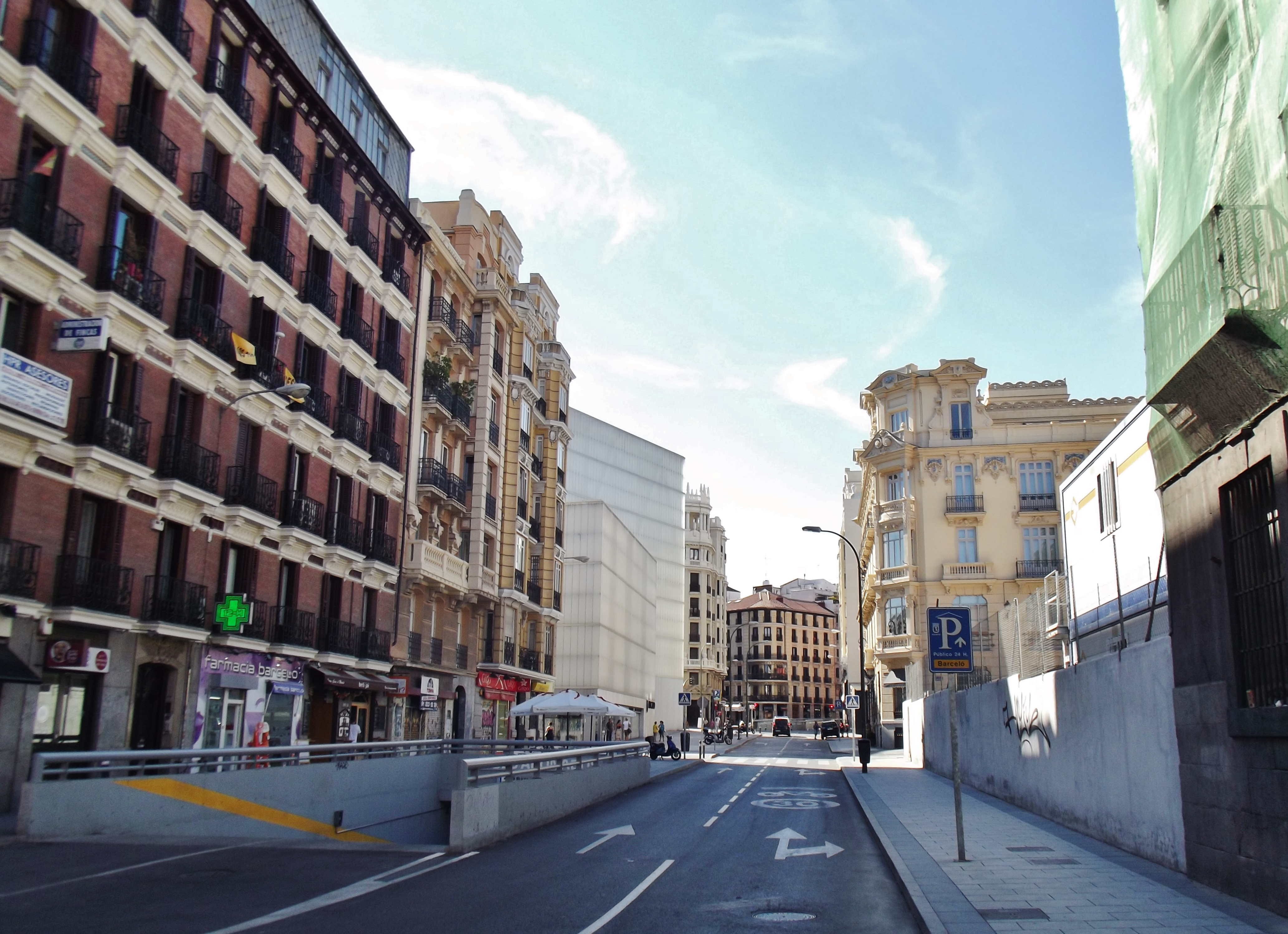 Calle de Mejía Lequerica, Madrid.